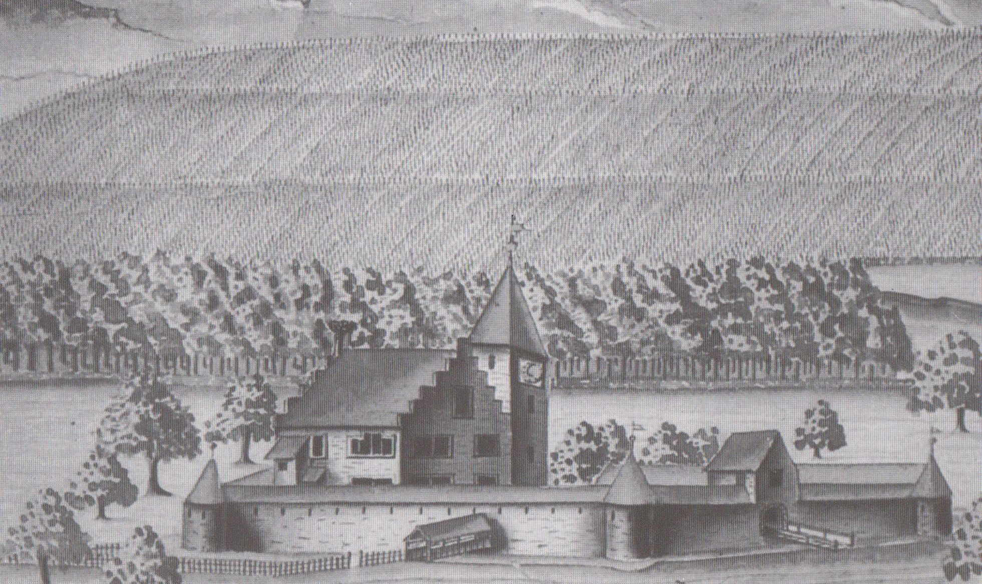 Deutschland - Baden-Württemberg - Bodenseekreis - Kressbronn - Ortsteil Gießen: Ausschnitt aus einer Wandkarte des Spitalökonomiegutes Gießen und der im Hintergrund mit Reben bewachsenen 'Hochwacht'